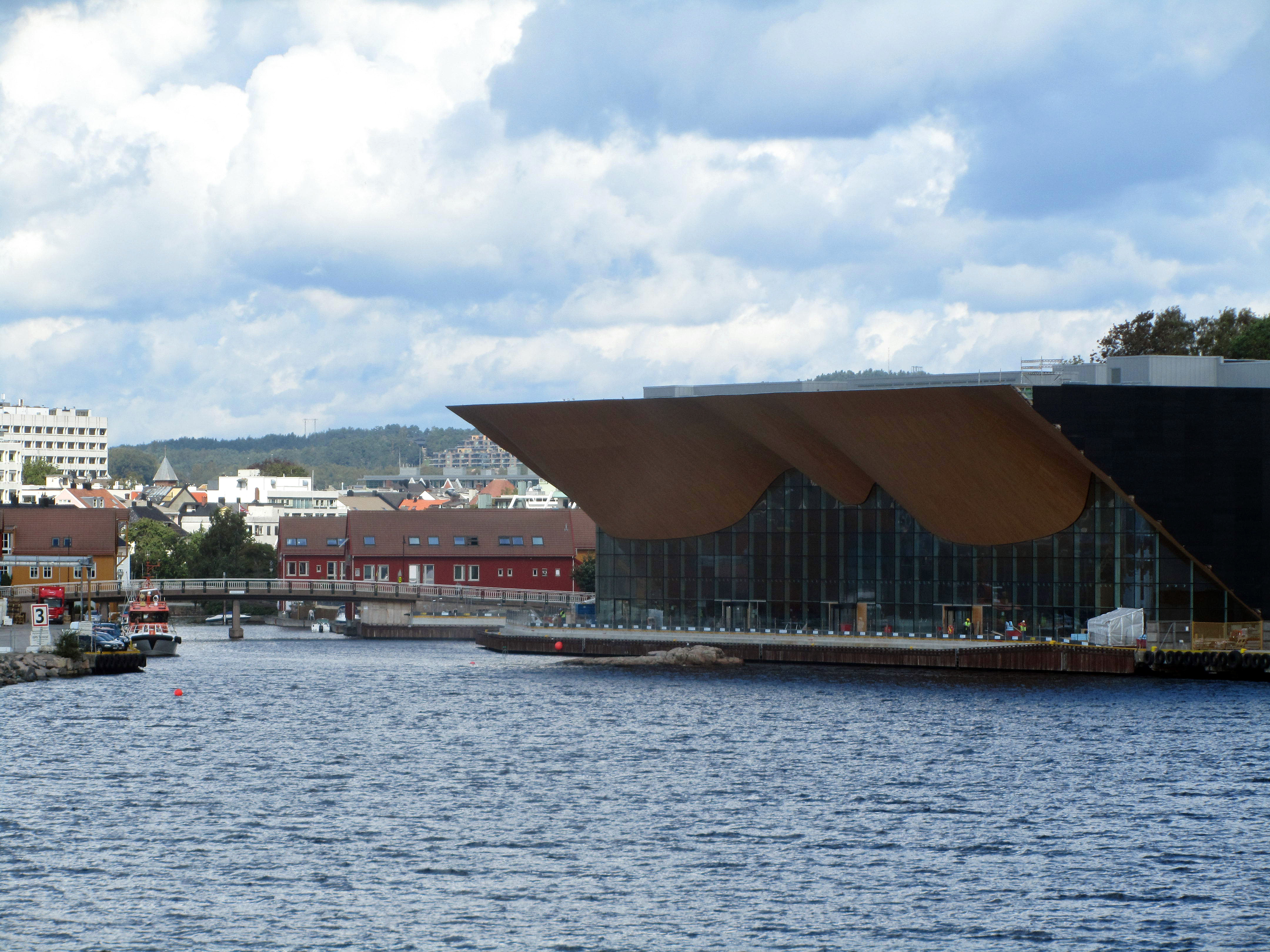 Kilden teater og koncerthus Kristiansand set fra havnen